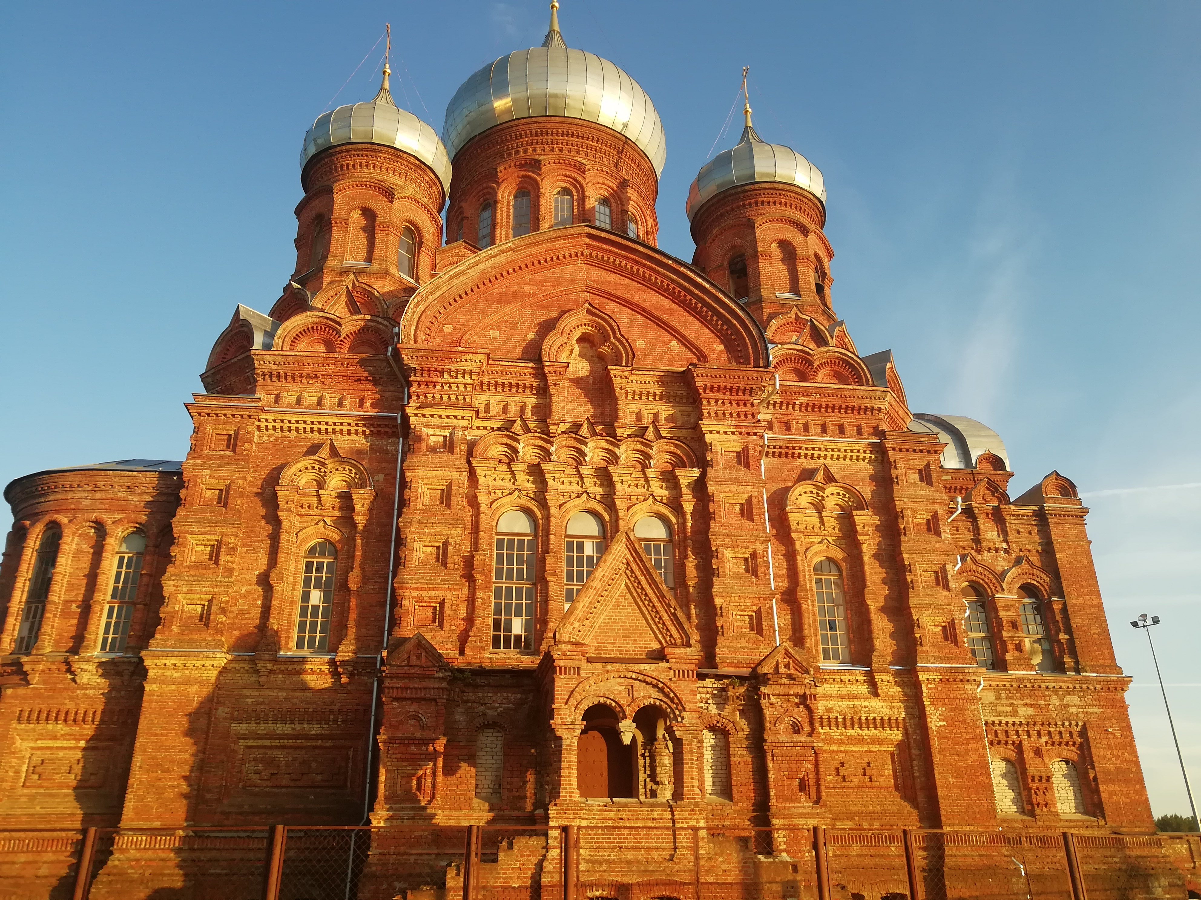 пос. Горушка Даниловского района